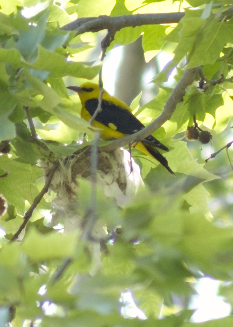 Oriolus oriolus en su nido - Oriolus oriolus in their nest, Llobregat Delta, Barcelona, Spain.